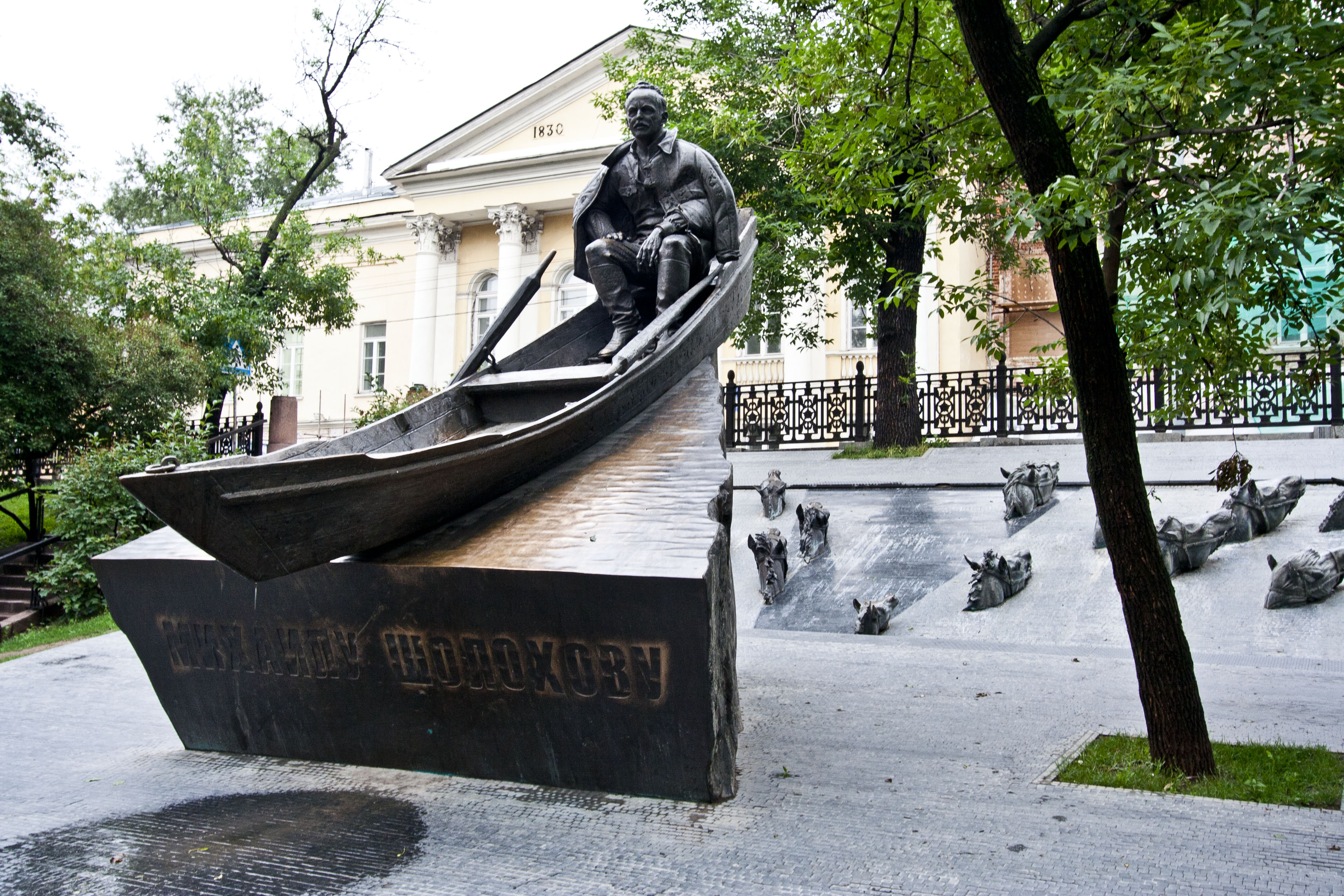 Шолохов и лошади на Гоголевском бульваре